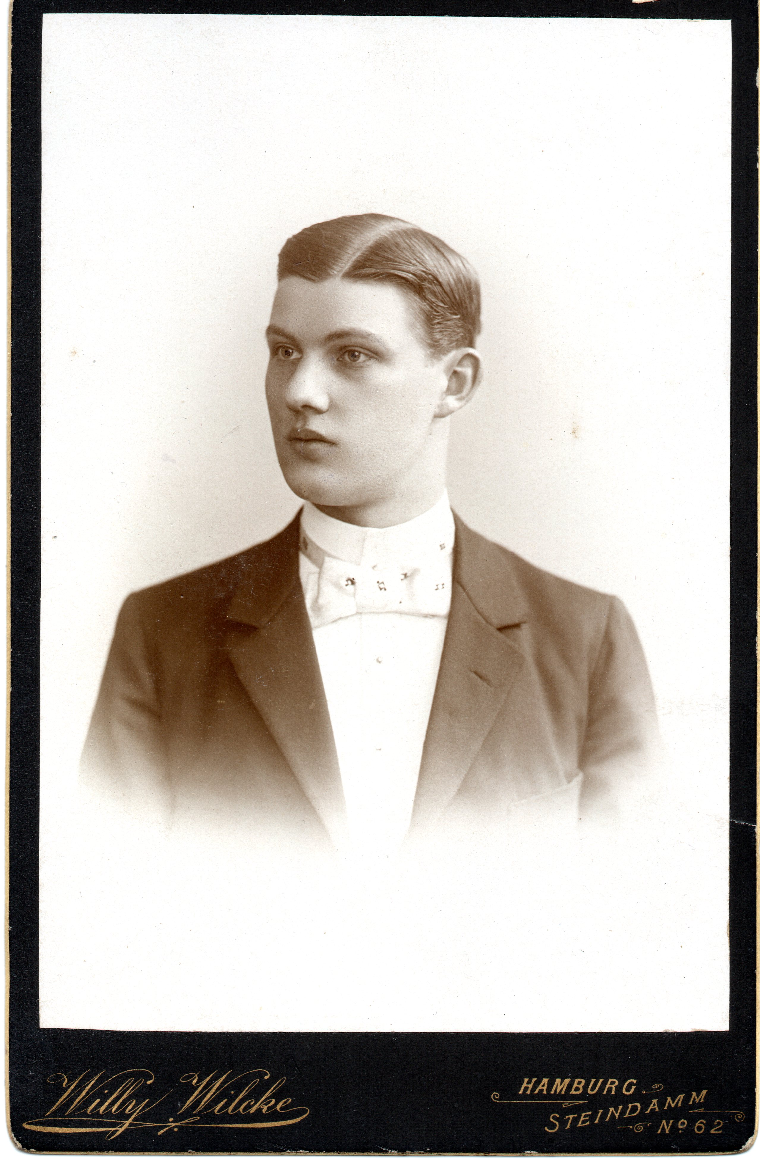 Bariton Friedrich Weidemann in jungen Jahren